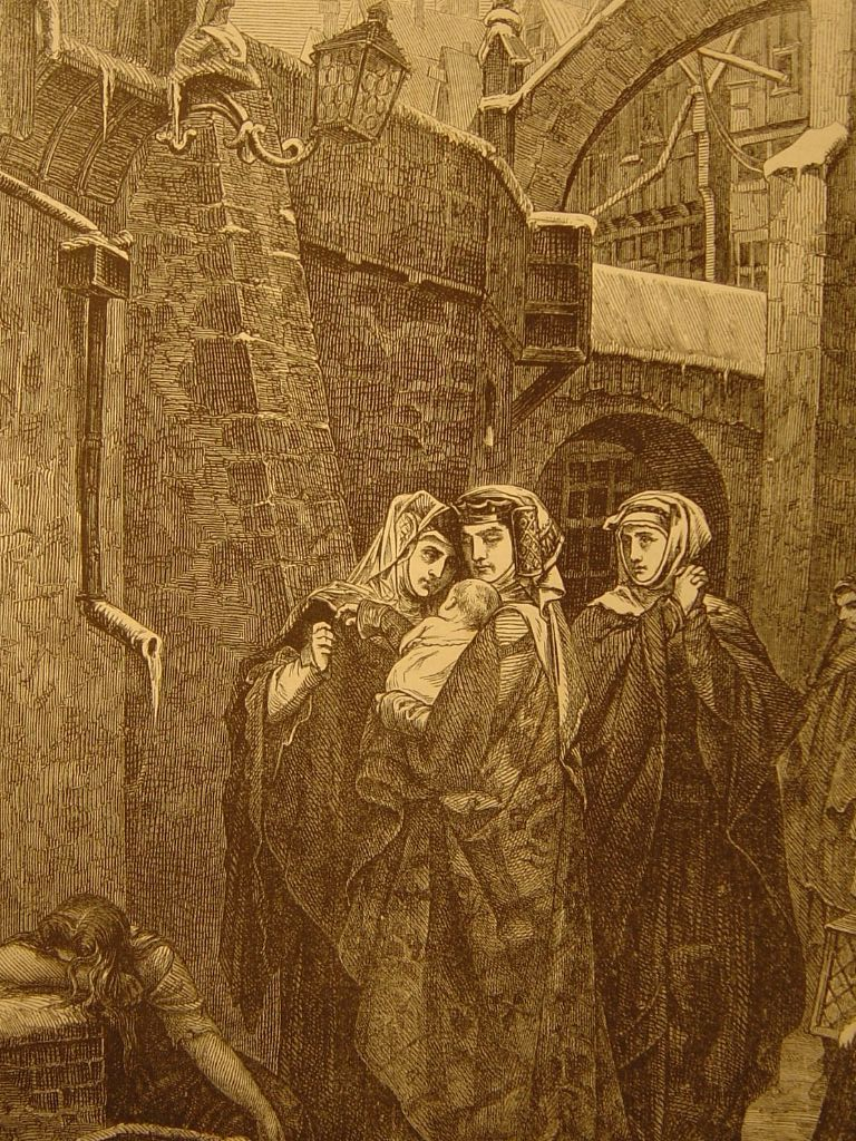 épisode de la famine de 1339 à Gand par Ferdinand Pauwels